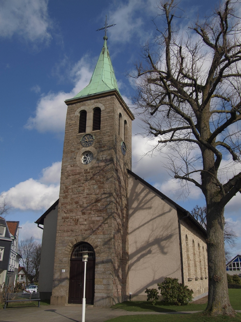 Kirchengebäude der Evangelischen Kirchengemeinde Dönberg, Wuppertal Höhenstraße 19. Denkmalnr. D 140 This is a photograph of an architectural monument. 140